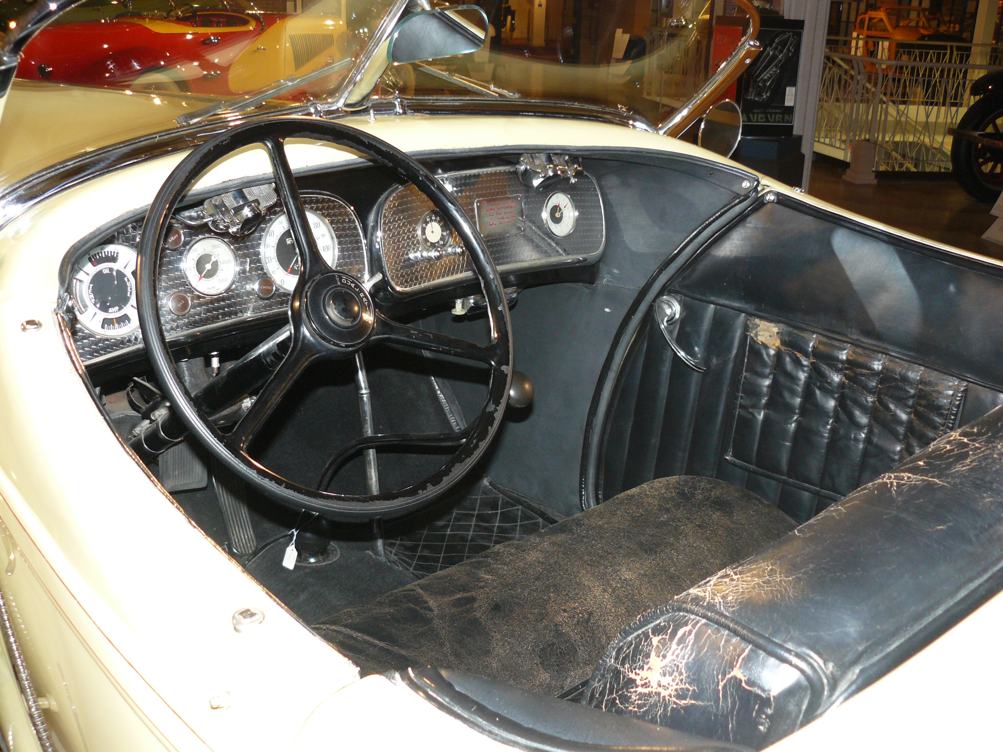 Auburn muséum 2013